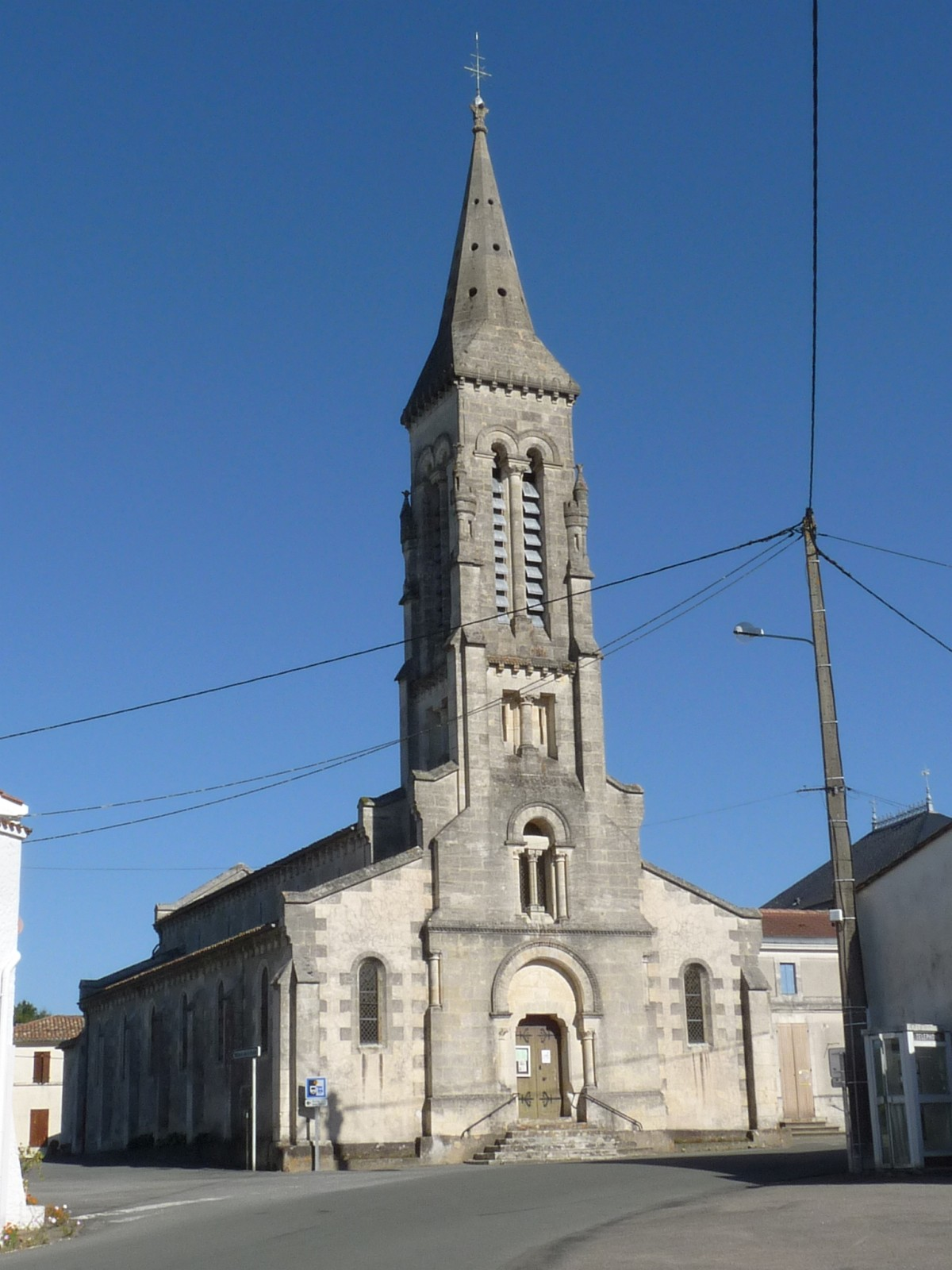 Eglise de Donnezac, Gironde, France